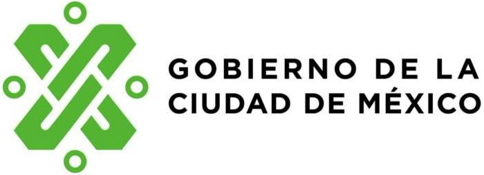 Logotipo institucional de la Ciudad de México utilizado durante el gobierno de Claudia Sheinbaum (2018-2024)